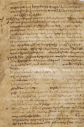 Codex Palatinus Graecus 252, folio 1r: Marcellinus, Vita Thucydidis